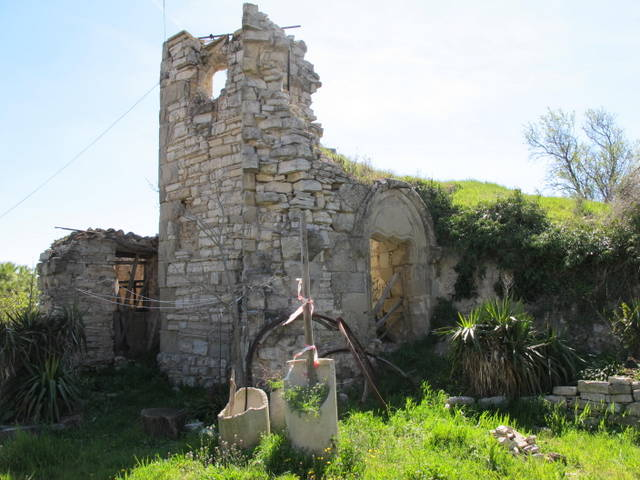 Castell de La Manresana a la Segarra - Catalunya